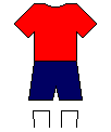 Tottenham-mez